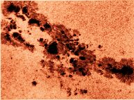 Sunspot